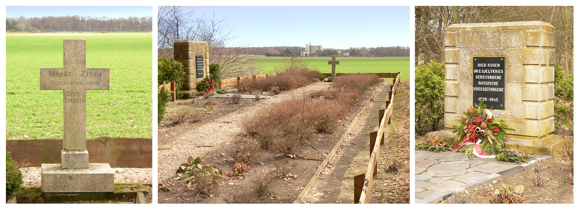 Kriegsgräberstätte Rühen Foto aufgenommen von Benutzer Benutzer:AxelHH, April 2006